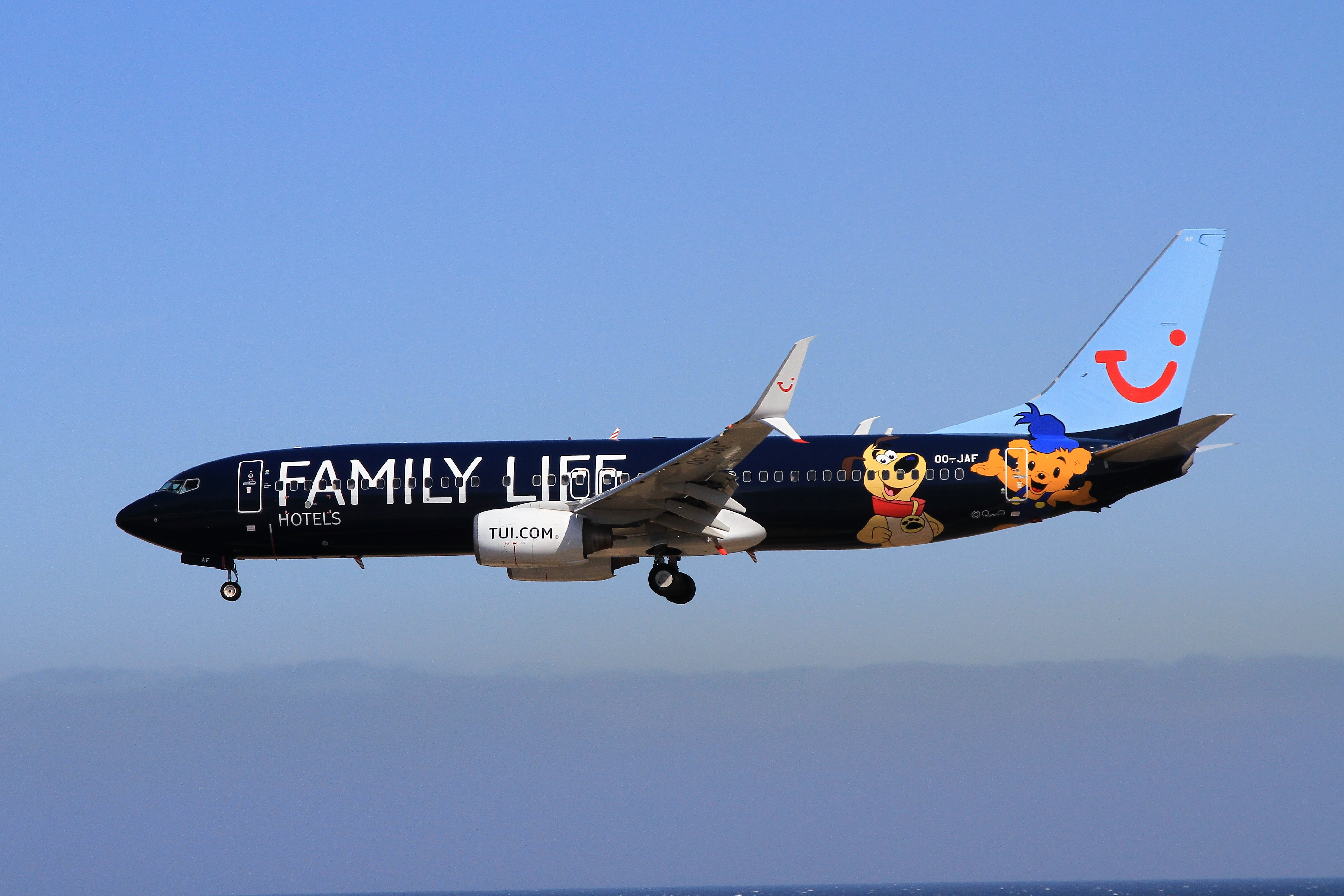 OO-JAF Boeing 737-8KS TUI Lanzarote 29-03-2017